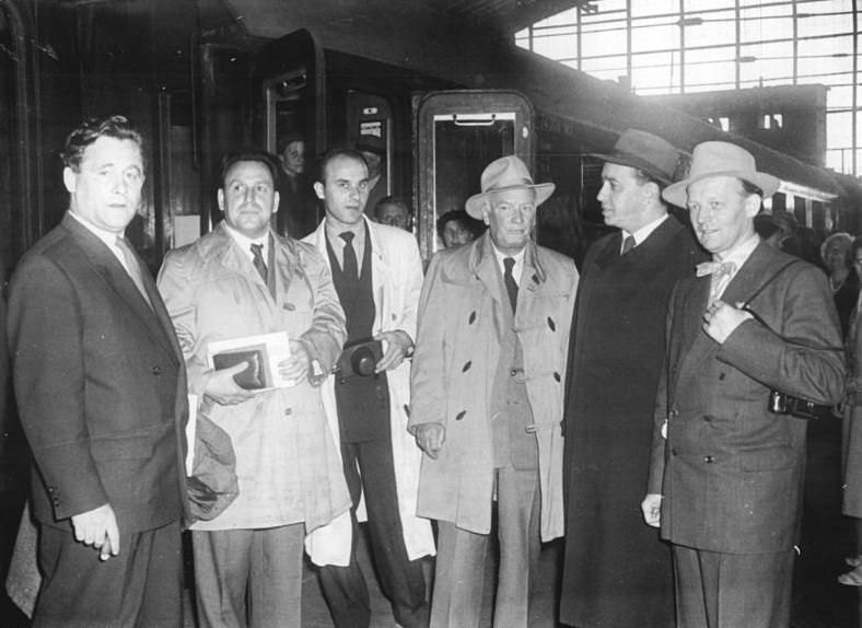 Zentralbild Quasch. 8.7.1955 Architektendelegation nach Holland abgereist. Zur Teilnahme am Internationalen Architektenkongress in Holland fuhr am 8.7.1955 eine Delegation der Deutschen Demokratischen Republik vom Berliner Ostbahnhof ab. UBz: (v.l.n.r.) Nationalpreisträger Prof. Henselmann, Chefarchitekt von Groß-Berlin; Koll. Mickin, Sekretär des Bundes Deutscher Architekten; Koll. Wimmer, Student; Nationalpreisträger Prof. Hopp; der Präsident der Deutschen Bauakademie, Prof. Liebknecht und der Vizepräsident des Bundes Deutscher Architekten Gericke.